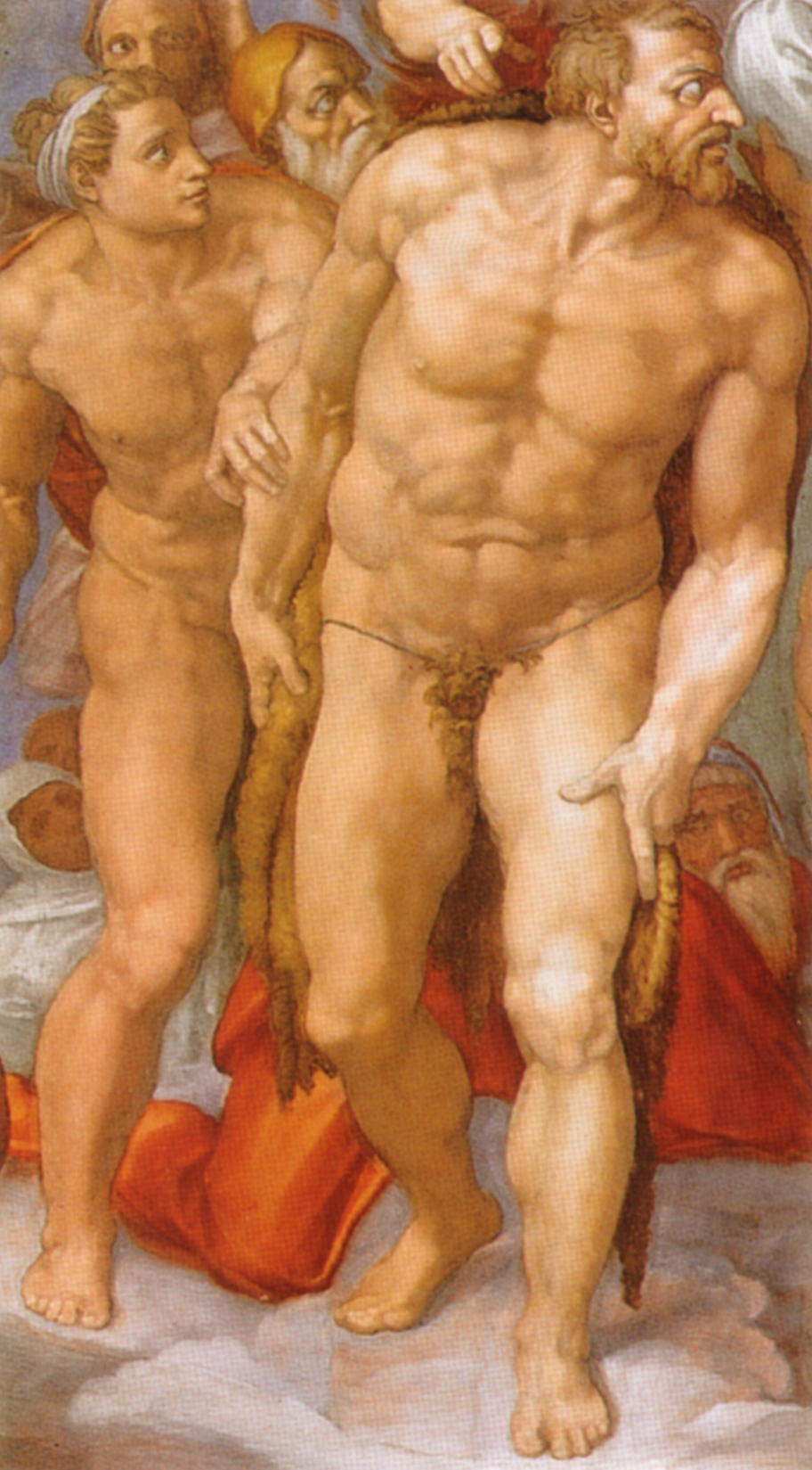 MICHELANGELO Buonarroti Last Judgment Fresco, 1370 x 1220 cm Cappella Sistina, Vatican